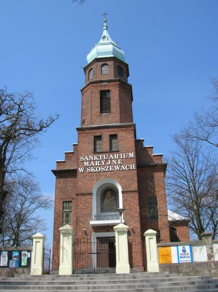 Sanktuarium Maryjne w Skoszewach.